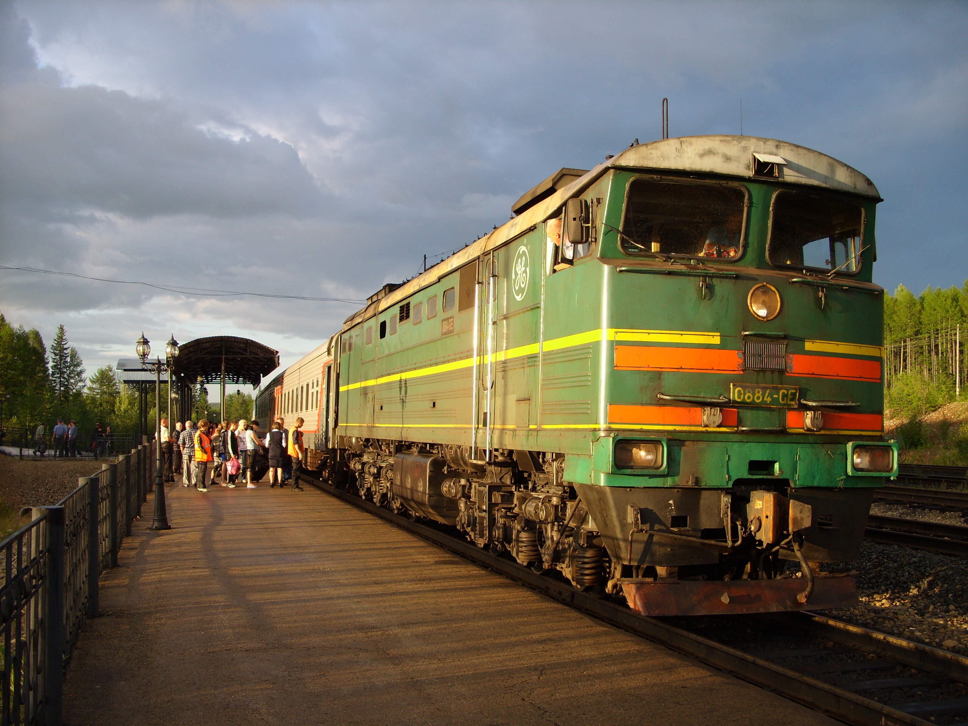 Станция Алдан летом 2011 года. По дороге в Благовещенск